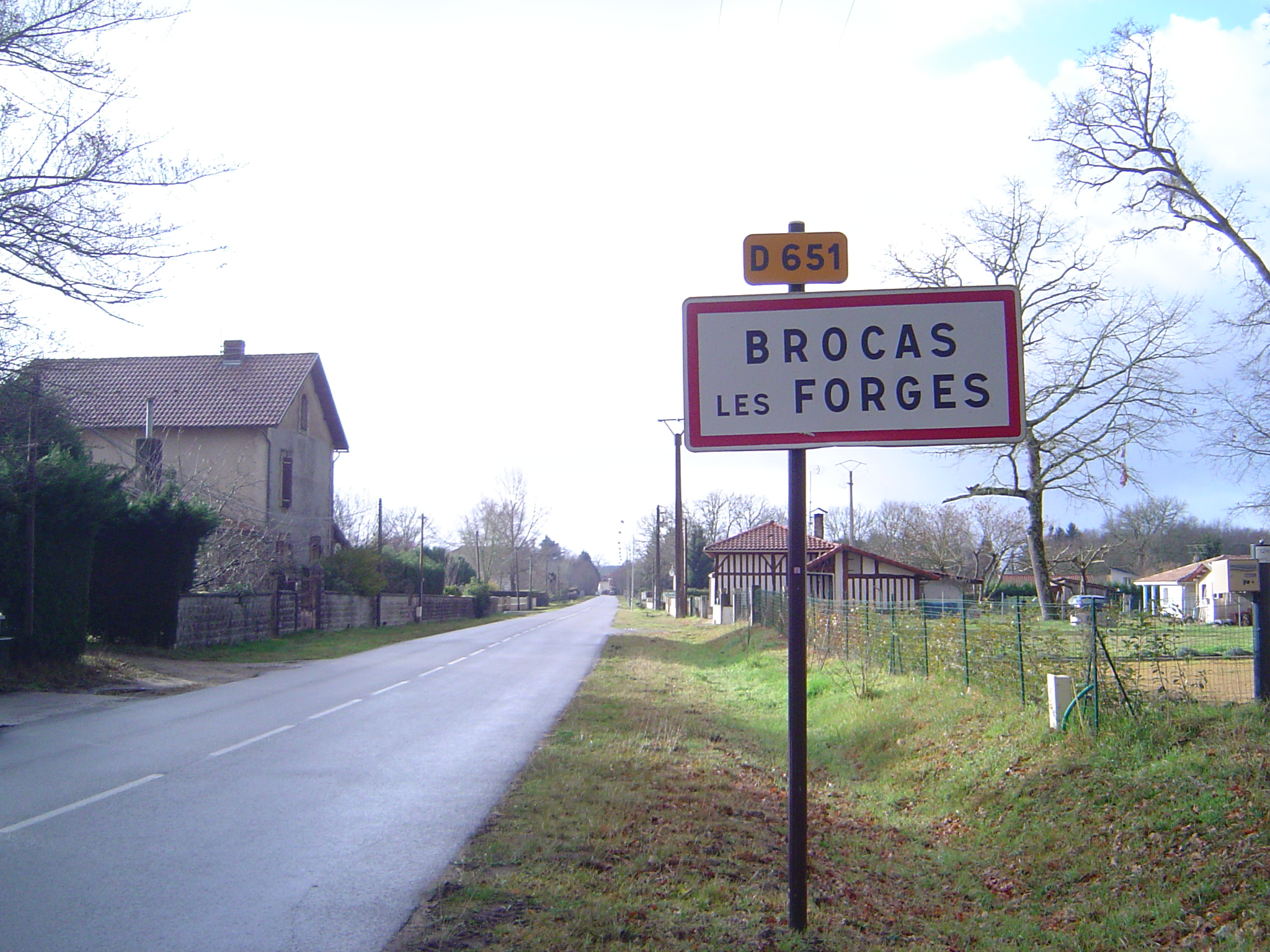 Panneau à l'entrée nord de Brocas, Landes, France